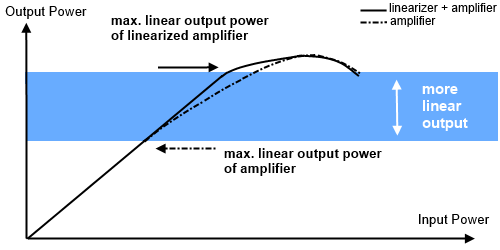 Ausgangsleistung in Abhängigkeit von der Eingangsleitung